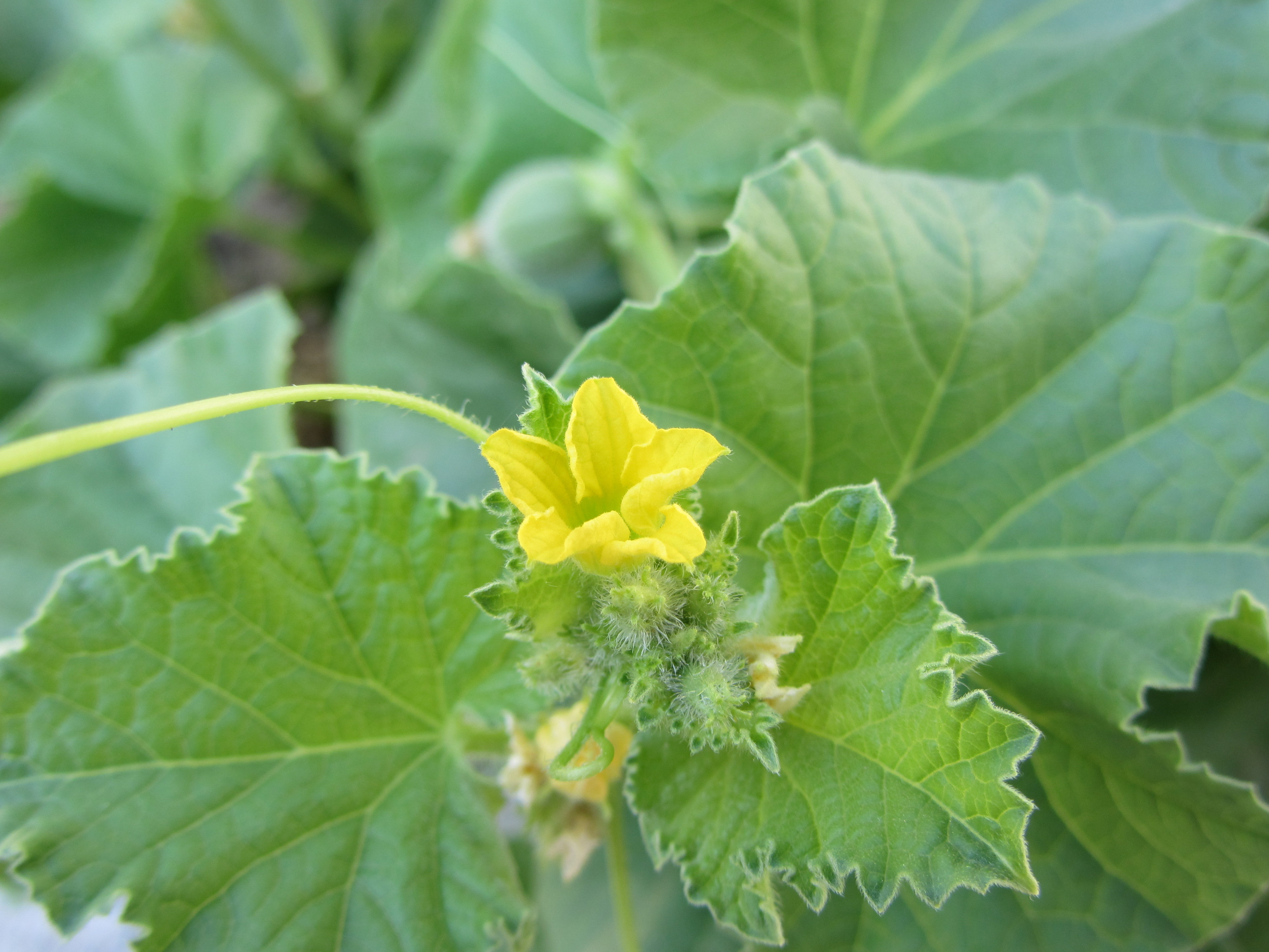 گیاه طالبی روییده در باغچه‌ای در اصفهان. تخم این گیاه در تیرماه ۱۳۹۱ خورشیدی کاشته شده و پس از کمتر از یک ماه، گل داده است. یک میوه‌ی طالبی کوچک تار در عمق تصویر نمایان است.